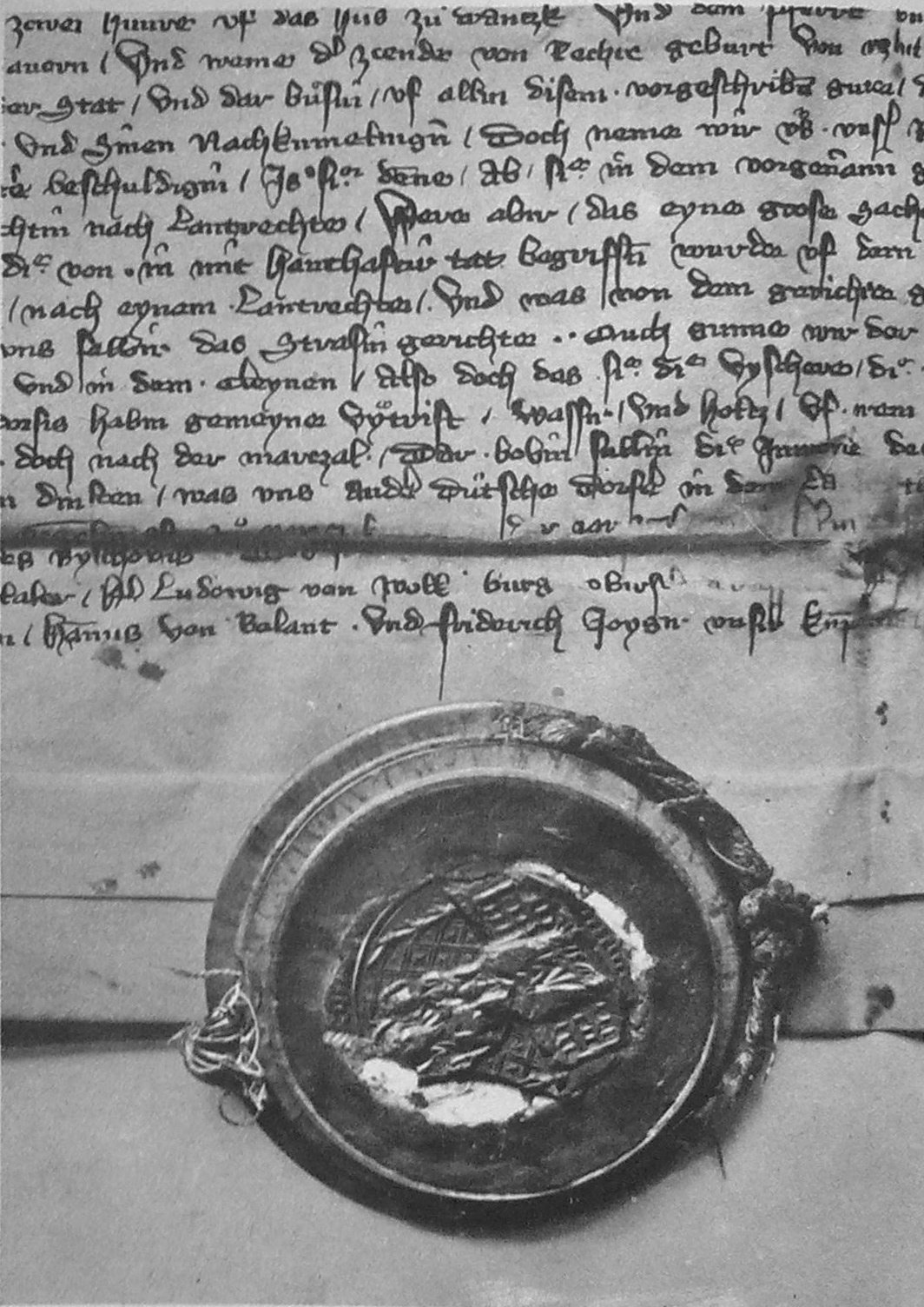 Przywilej lokacyjny dla miasta Pucka widoczna pieczęć Wielkiego Mistrza Zakonu Krzyżackiego